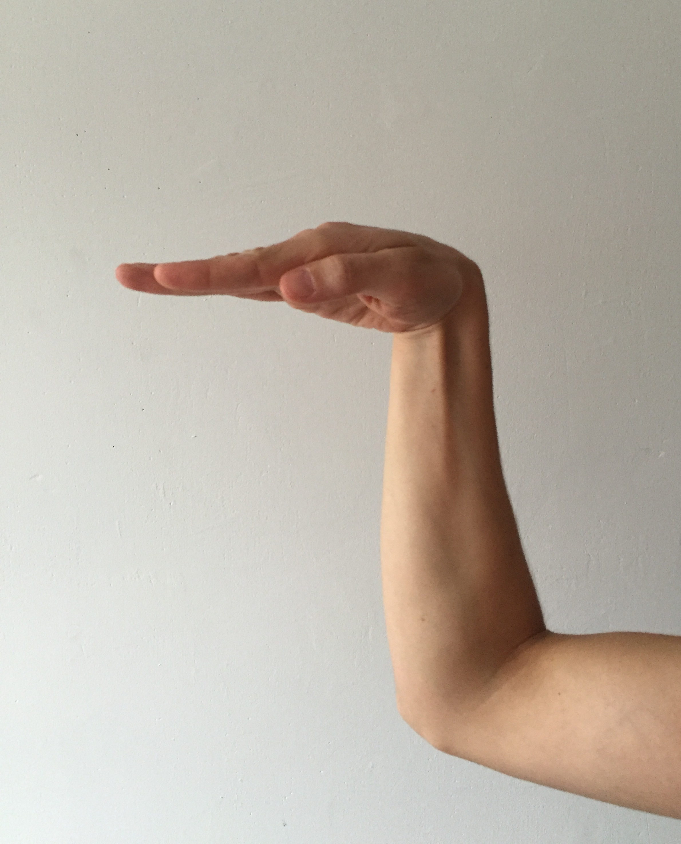 Style du serpent en Kung Fu